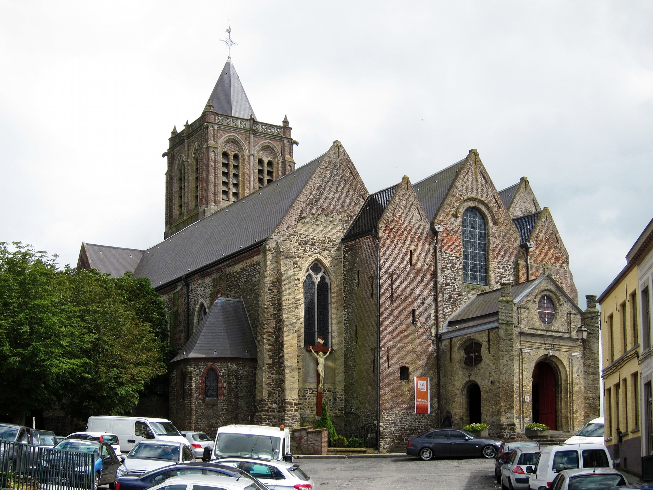 La collégiale Notre-Dame à Cassel (Nord).